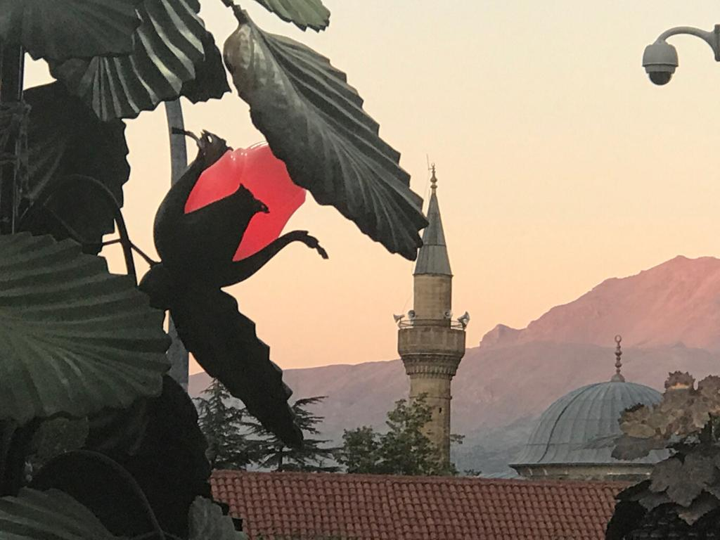 In Isparta sind viele Straßenlaternen als Rosen dekoriert.